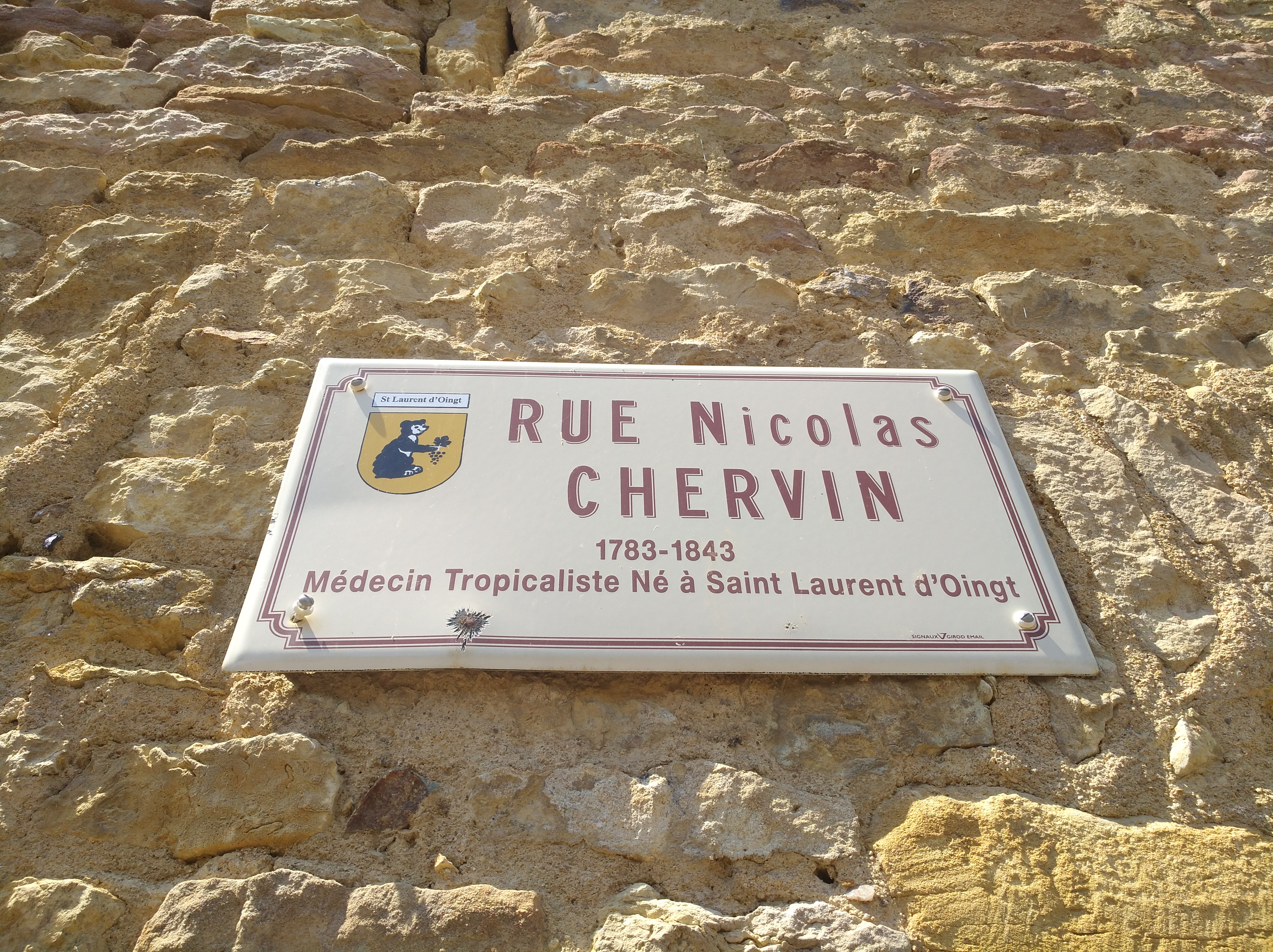 Plaque de la rue Nicolas Chervin à Saint-Laurent-d'Oingt (commune de Val-d'Oingt, Rhône, France).